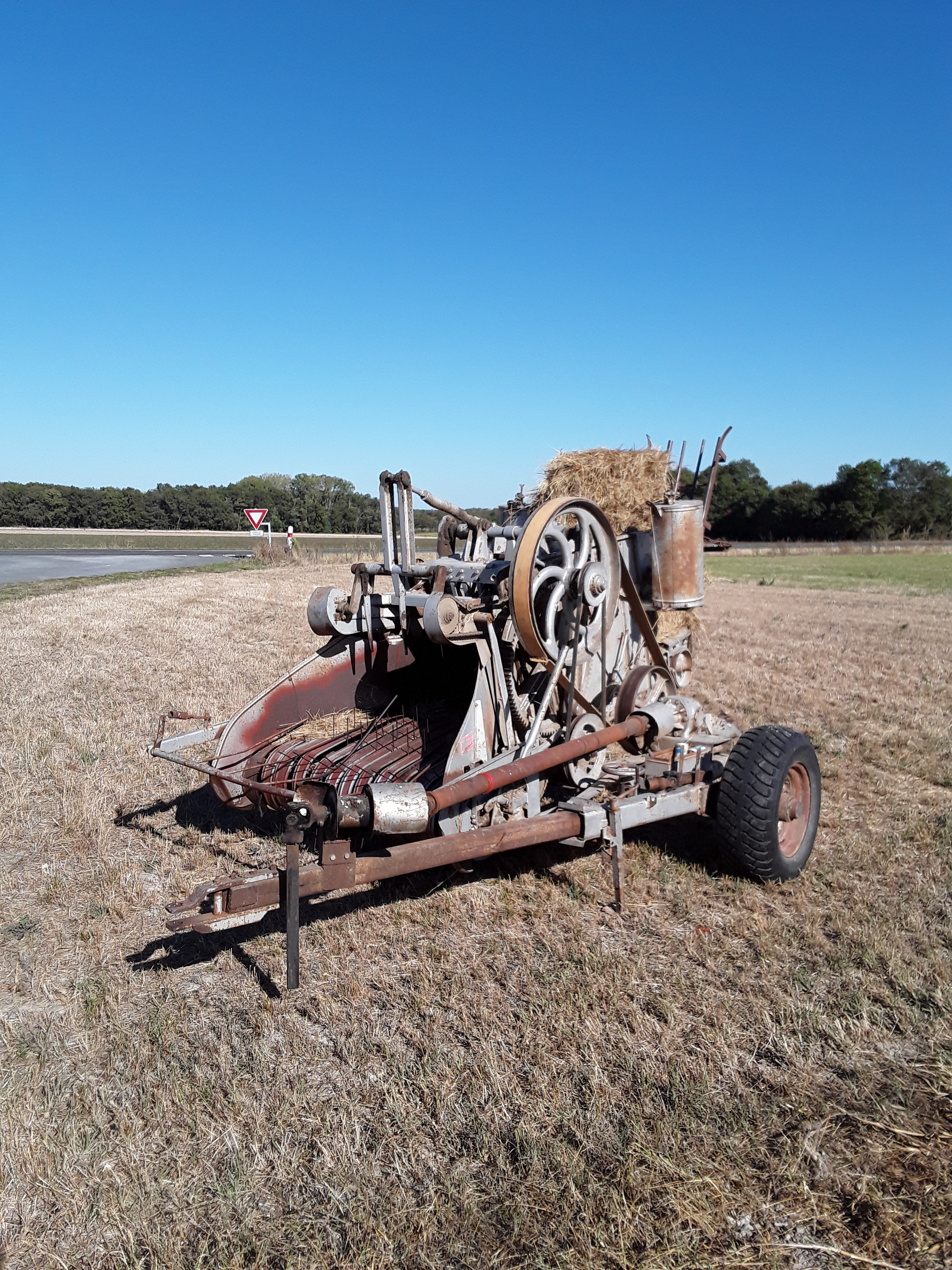 Ramasseuse-Presse Rivière-Casalis à basse densité